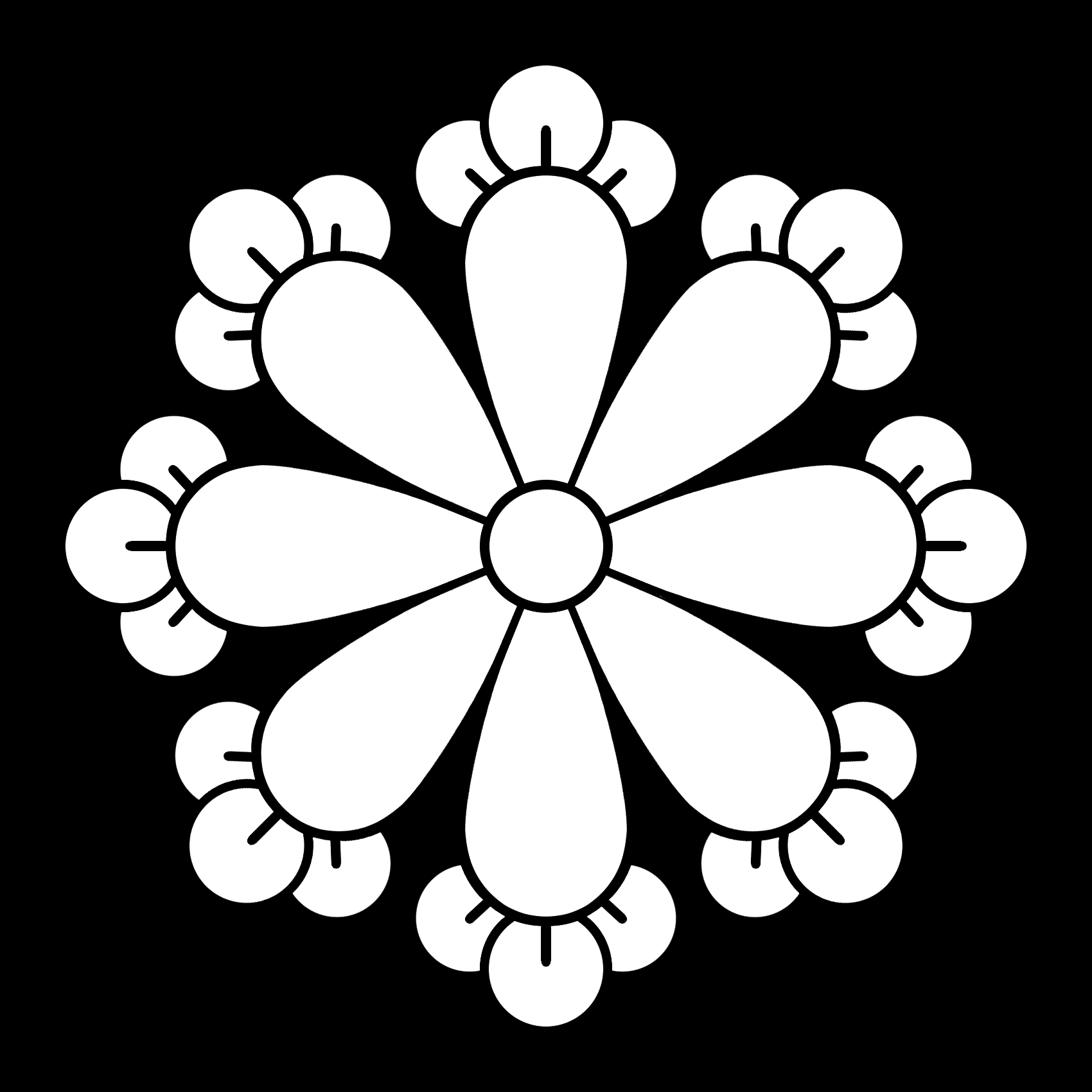 「八つ丁字車」紋（染抜）